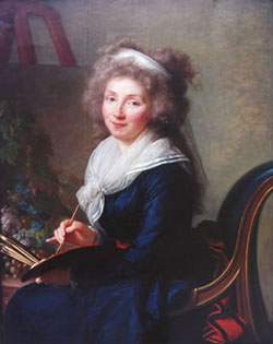 La marquise de Grollier par Elisabeth Vigée Le Brun